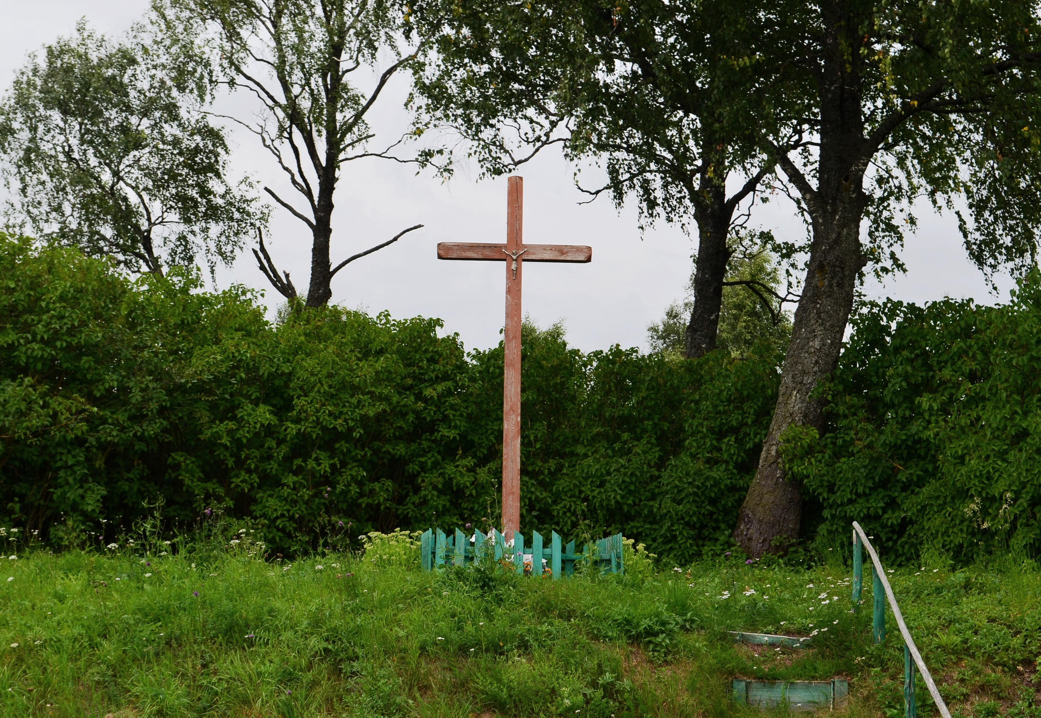 Kryžius kapinėse laidotų mirusiųjų atminimui, Burkila, Vilniaus r.